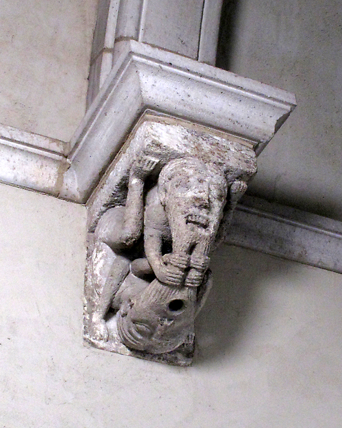 Corbel fron l'Abbaye de La Sauve-Majeure